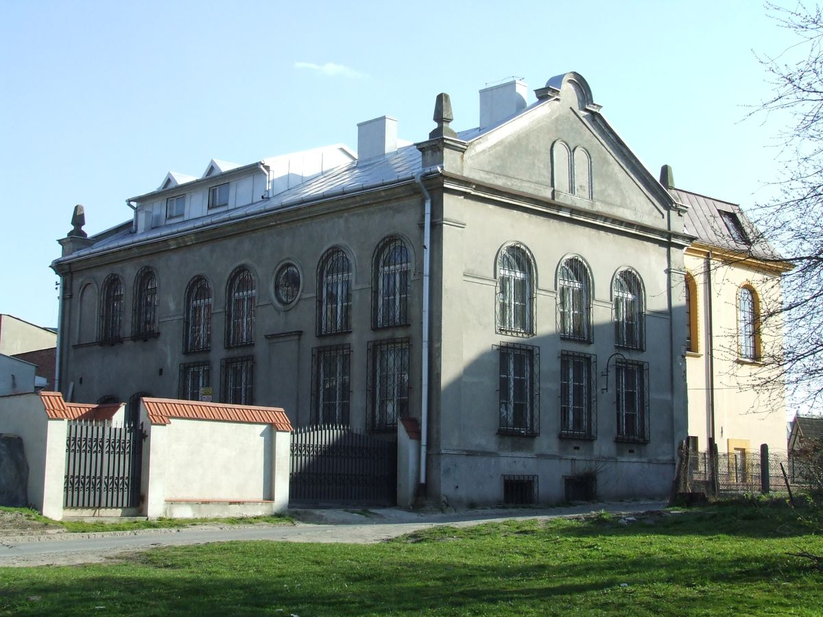 Small synagogue, Jarosław, Poland